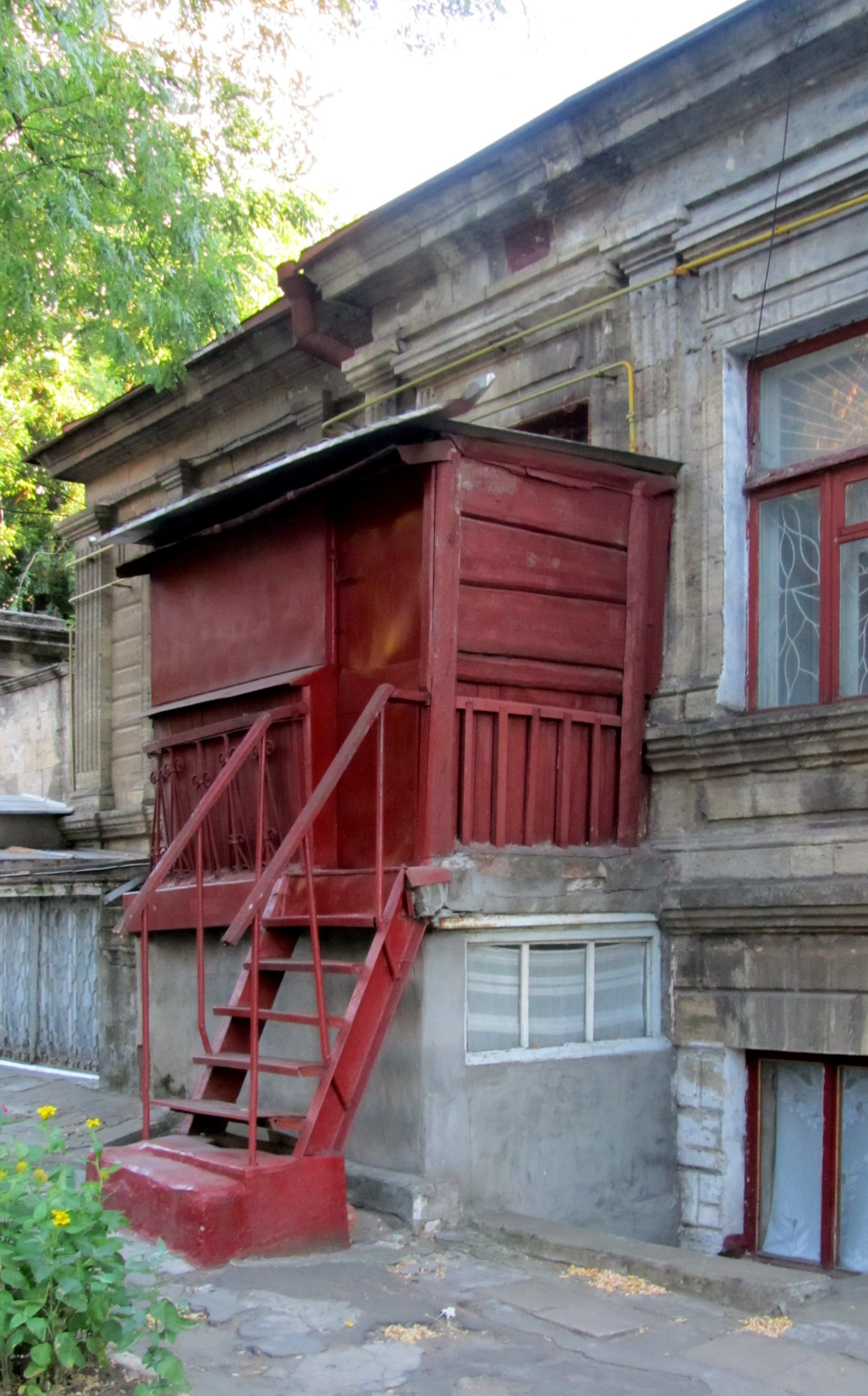 городской_артефакт